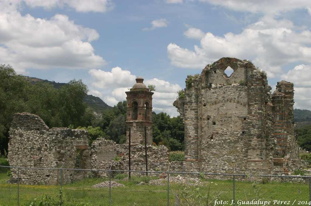 Totolac, Tlaxcala Foto: J. Guadalupe Pérez /2014